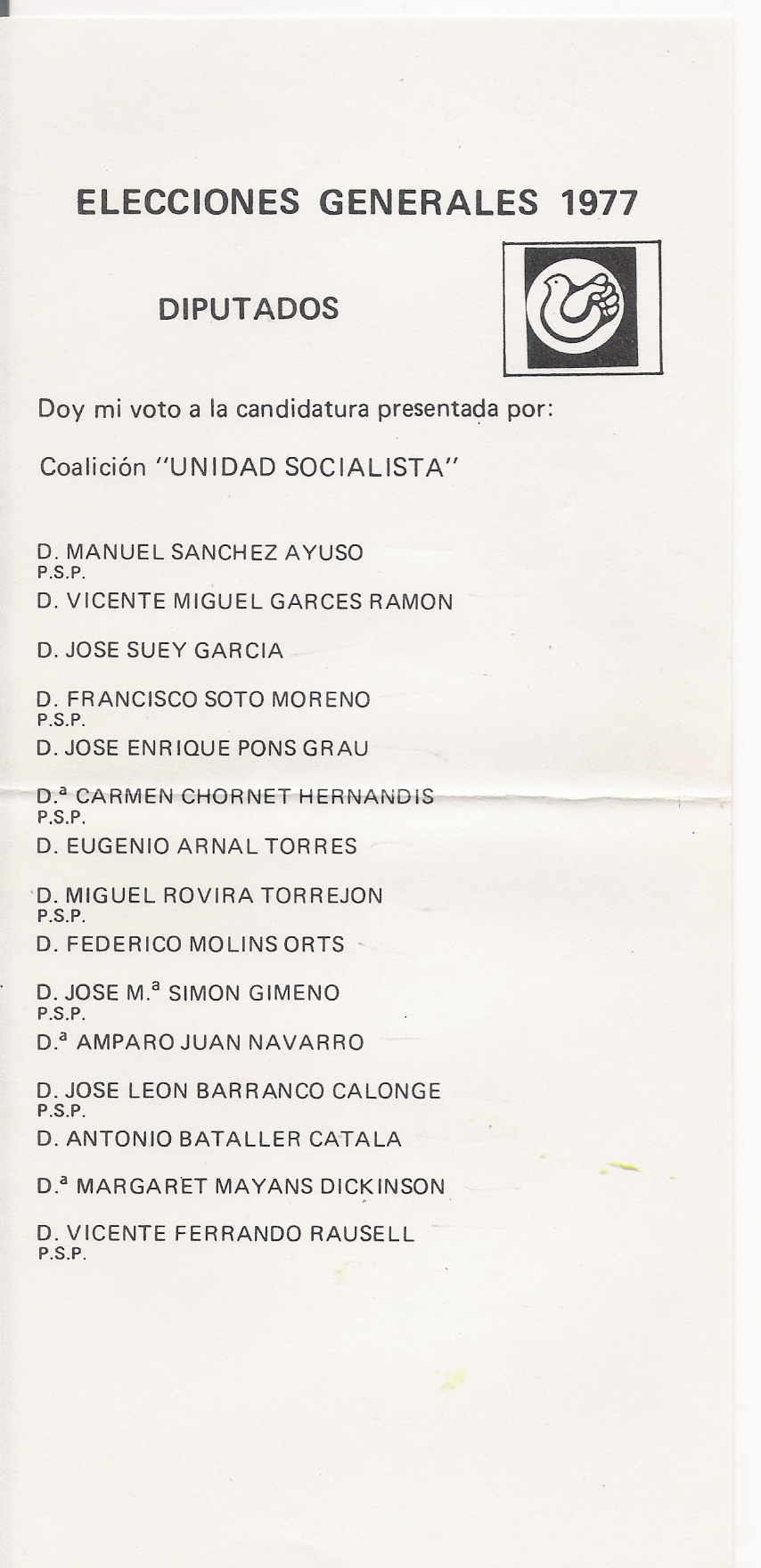 Candidatura al Congreso de la coalición Unidad Socialista por Valencia en 1977. El principal partido de la coalición era el PSP.